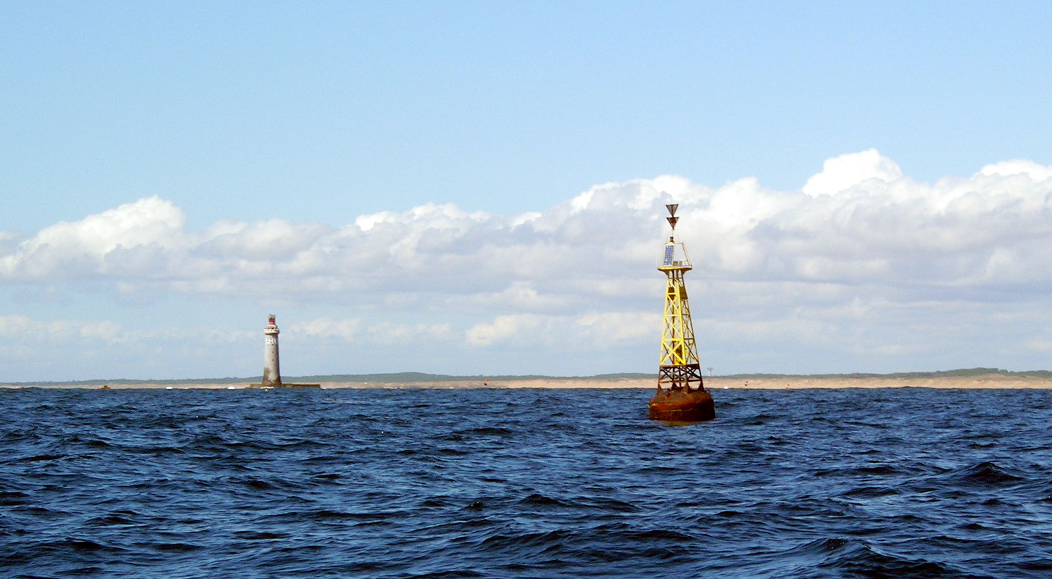 Phare des Barges, au large des Sables d'Olonne avec sa bouée Sud